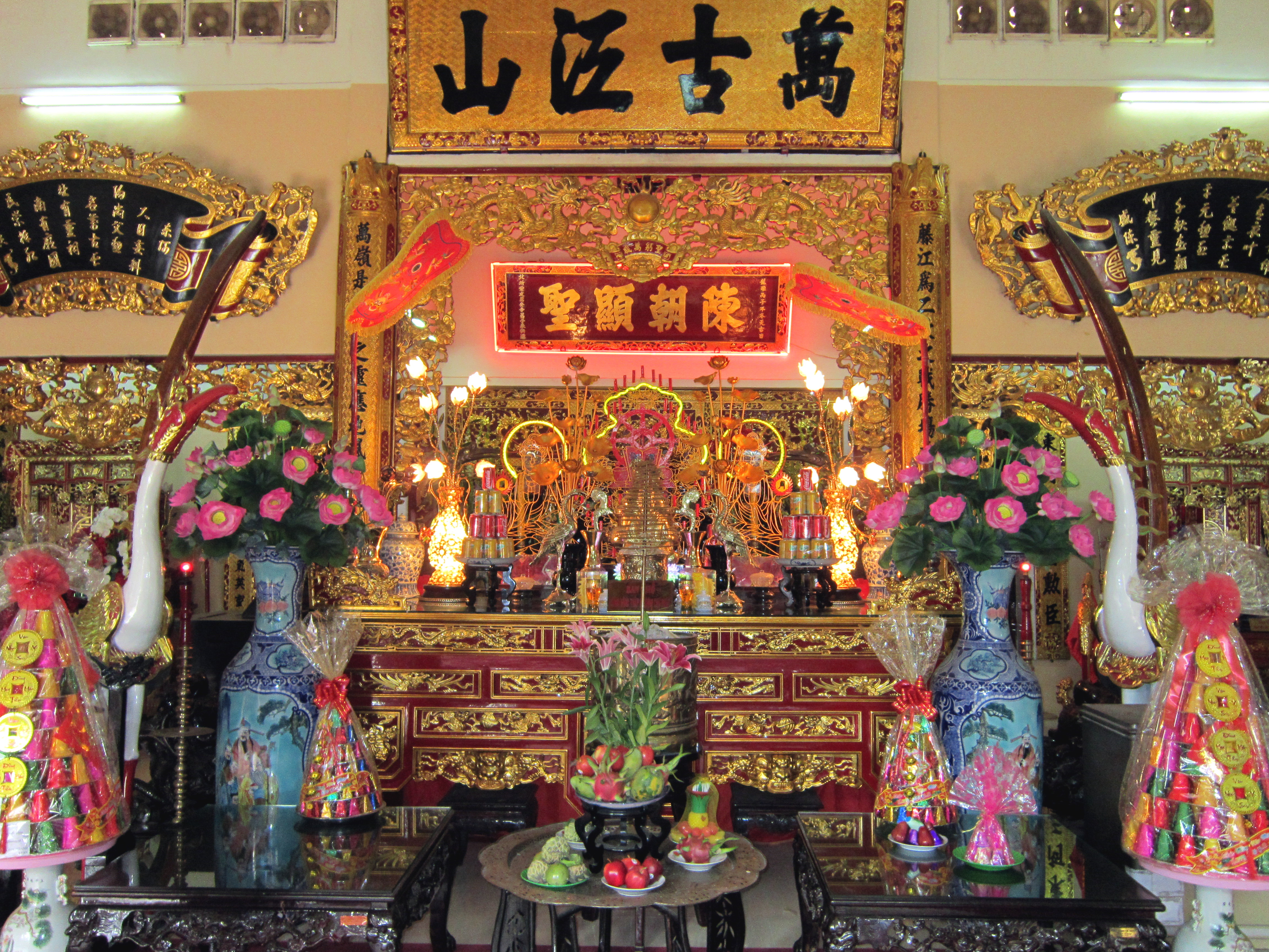 Chính điện đền thờ Trần Hưng Đạo ở số 36 đường Võ Thị Sáu, thuộc phường Tân Định, quận 1, Thành phố Hồ Chí Minh, Việt Nam.